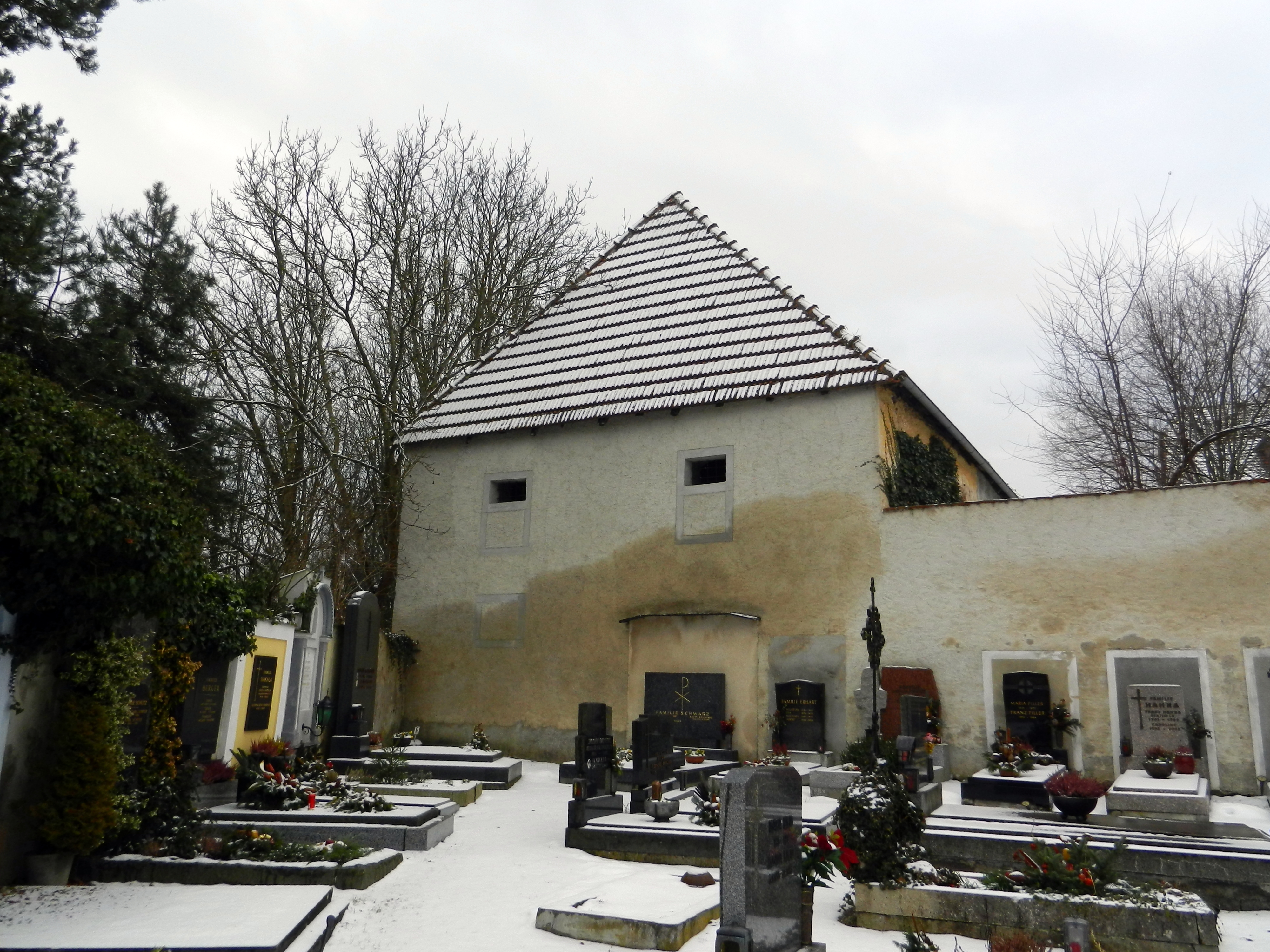 Kasten der Propstei Zwettl